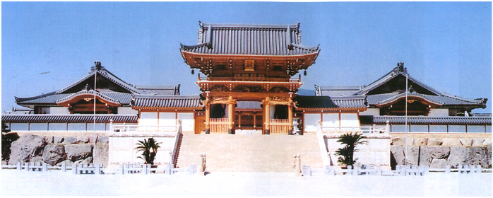 念佛宗三寶山無量壽寺 九州本山の山門